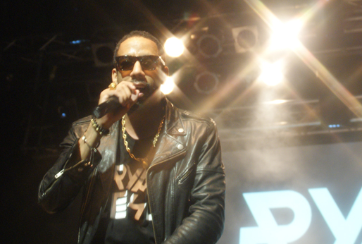 Ryan Leslie - Live in Hannover (Capitol) am 11.11.2012